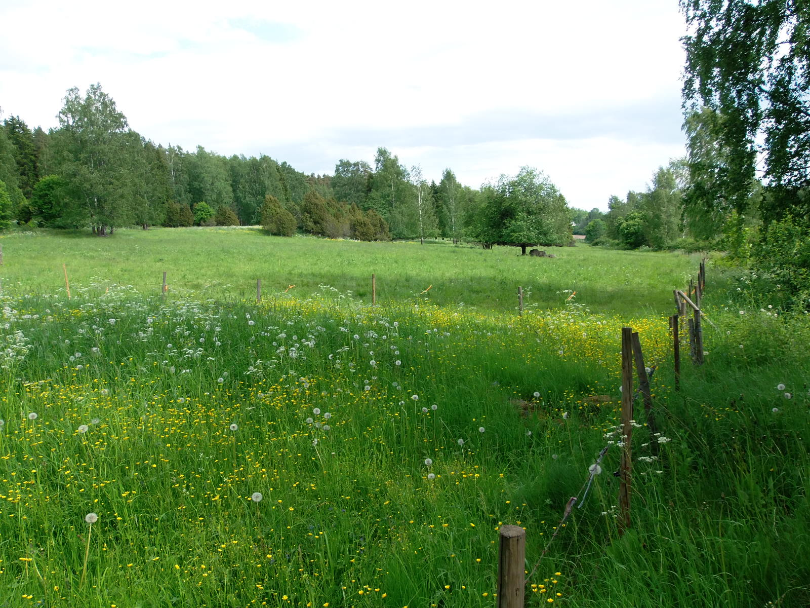 Rapolan harjua Vanajan rannalla.